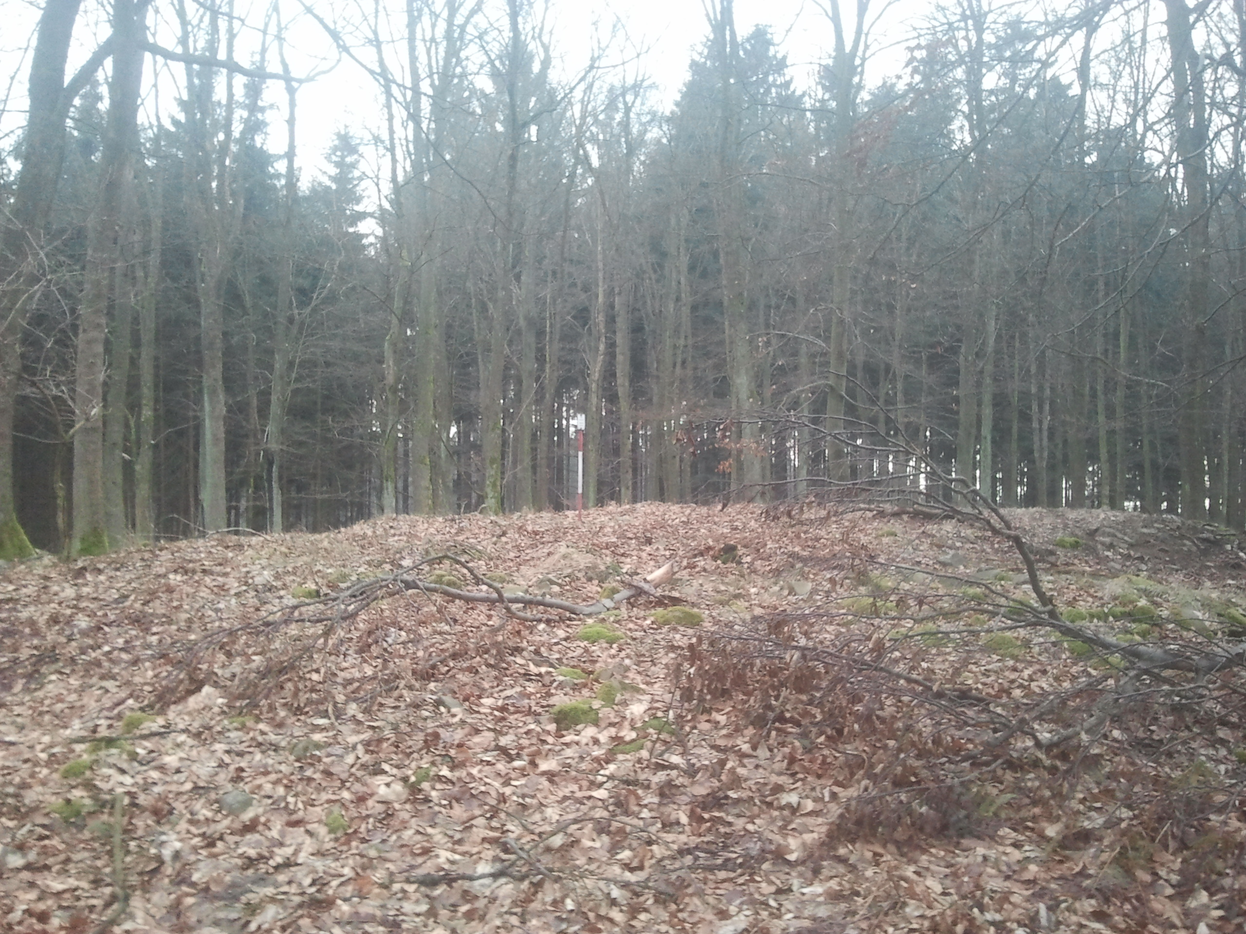 Vrchol Sirské hory